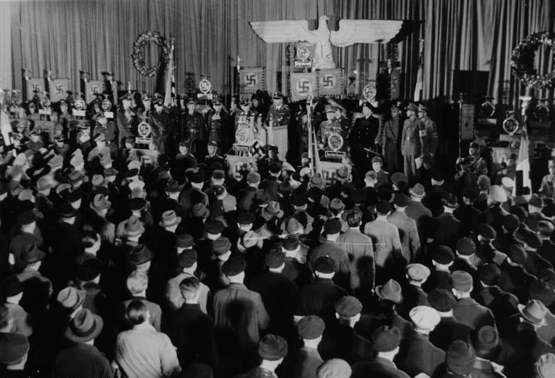 [am Tag der Völkerschlacht (18. Okt.)] Der Führer verkündet den Volkssturm Überblick während der Rede des Reichsführers SS Heinrich Himmler auf dem ersten Appell vor den Volkssturmmännern in Ostpreußen. 19-10-44 [Herausgabedatum]-beu-gu-ada 200 Presse Hoffmann